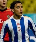 Omar Bravo, CSKA Moscow 3-0 Deportivo de La Coruna (UEFA Cup 2nd Round)